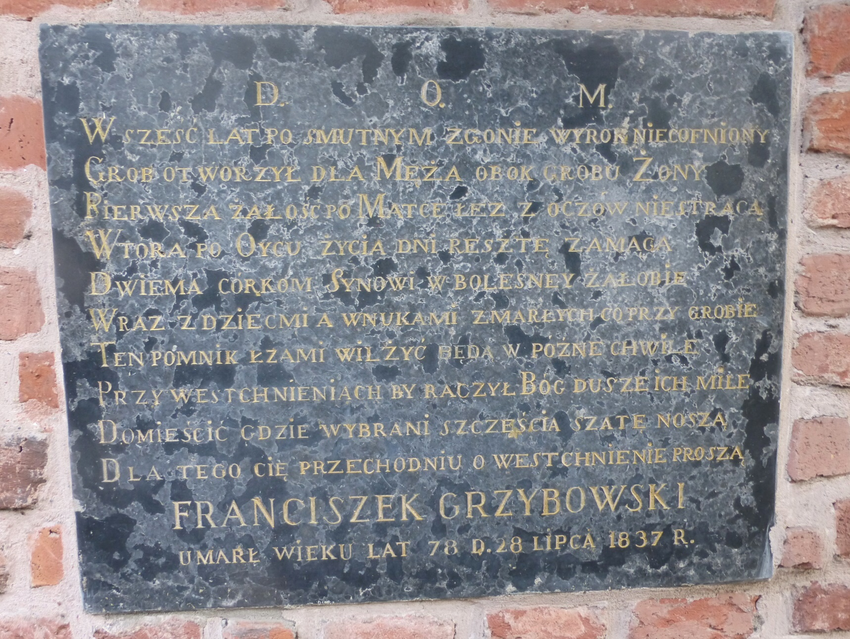 Tablica epitafijna Franciszka Grzybowskiego (1759-1837) na Cmentarzu Rakowickim (pas Lb)